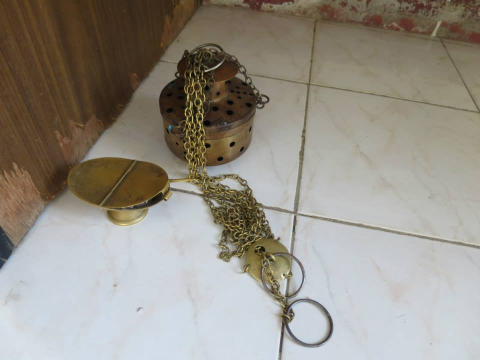 Igreja de Sao Tiago de Hera